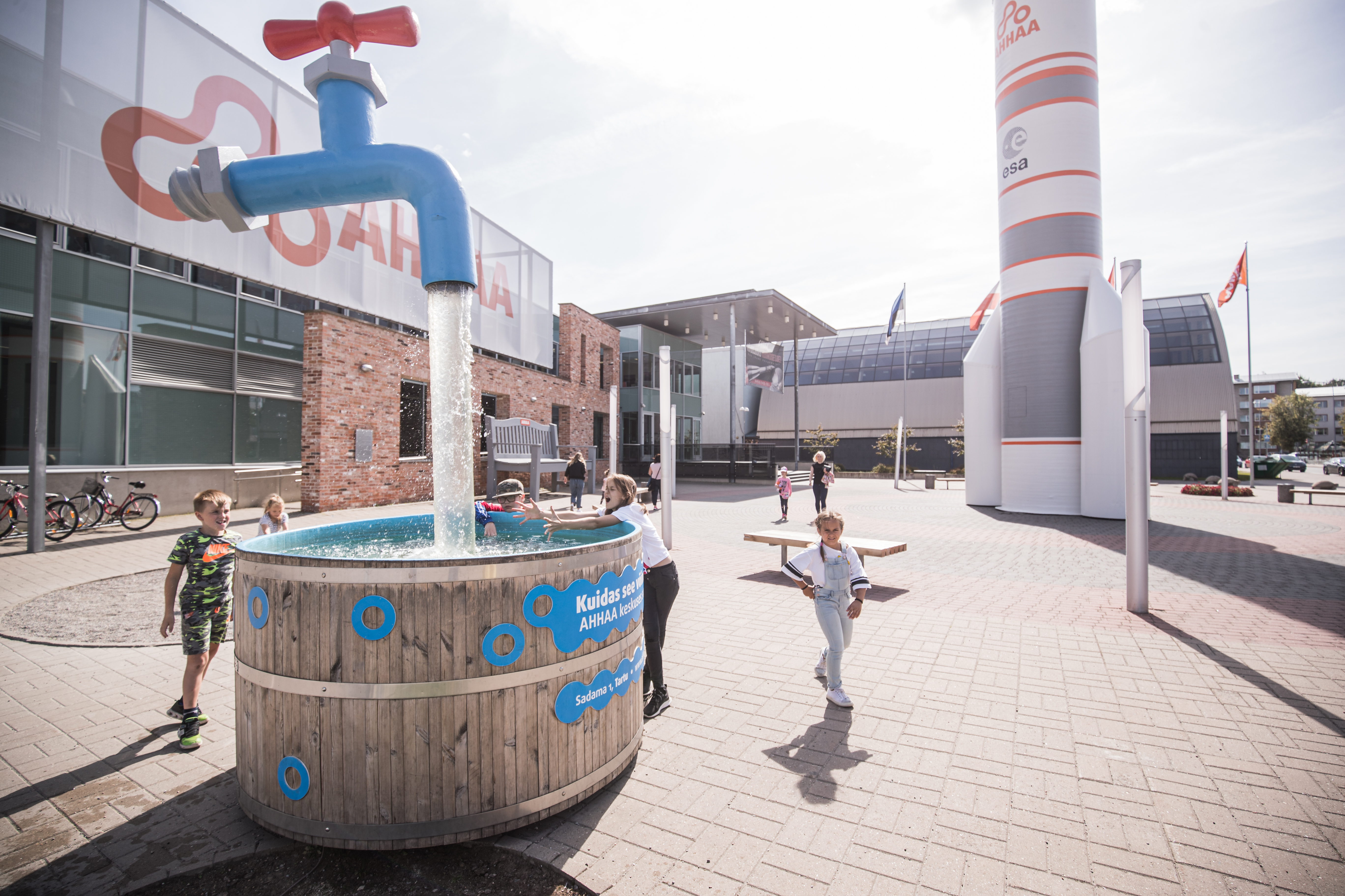 AHHAA fassaad ja välieksponaadid. Esiplaanil võimatu kraan, taustal paistavad hiigelpink ja raketi Ariane 6 makett.